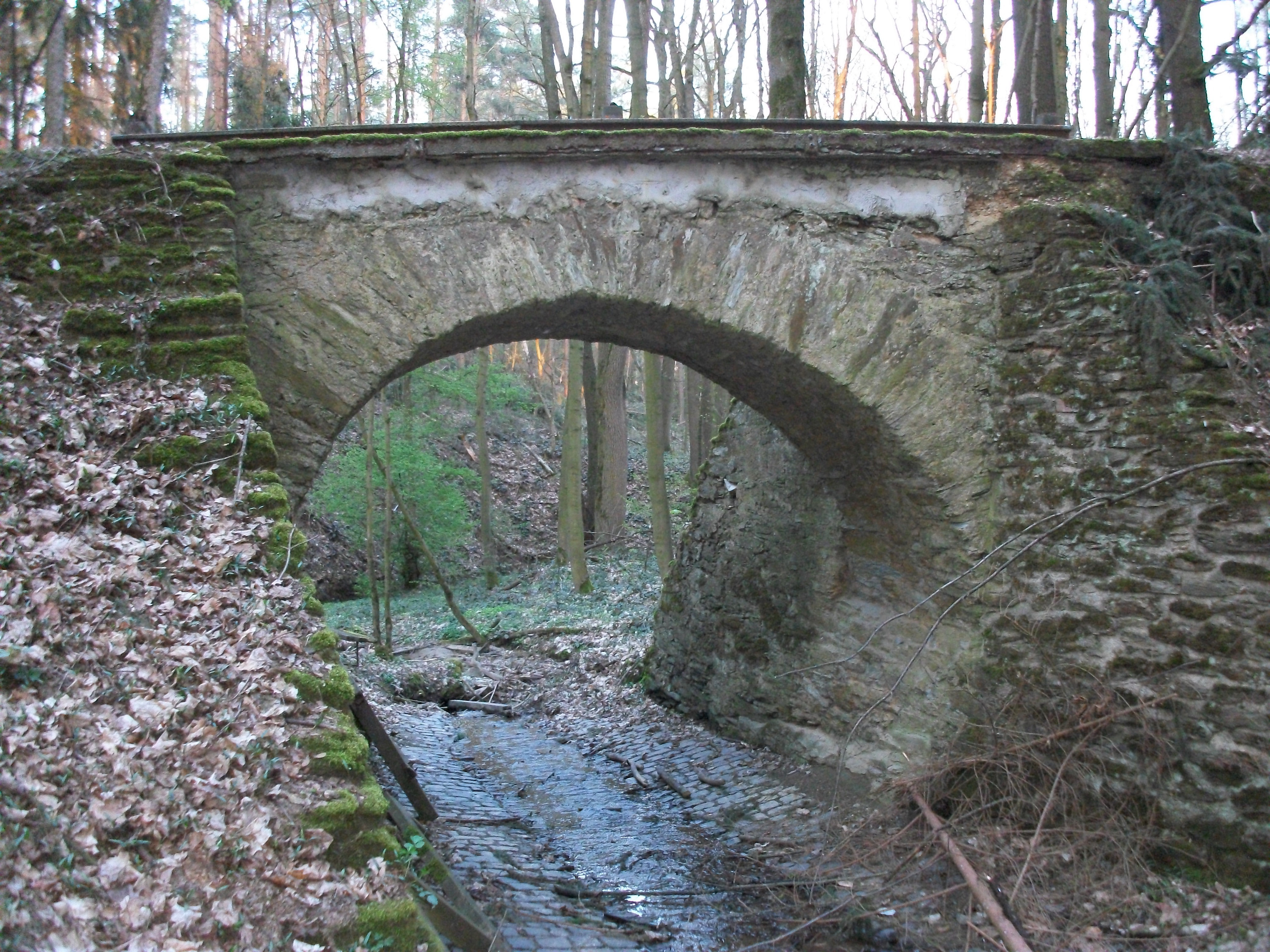 Schieferbrücke Eichlaide